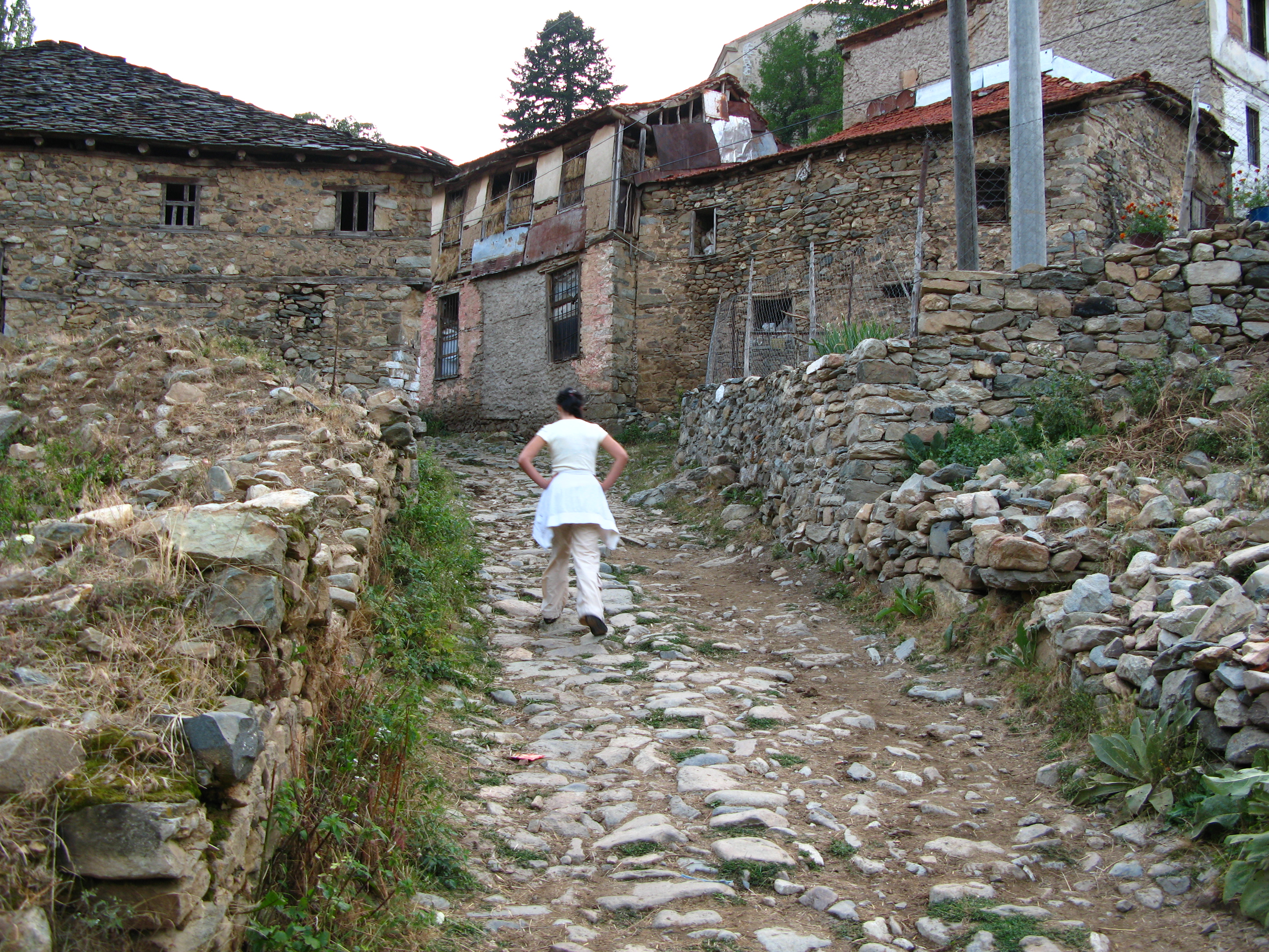 село Маловиште, битољско.